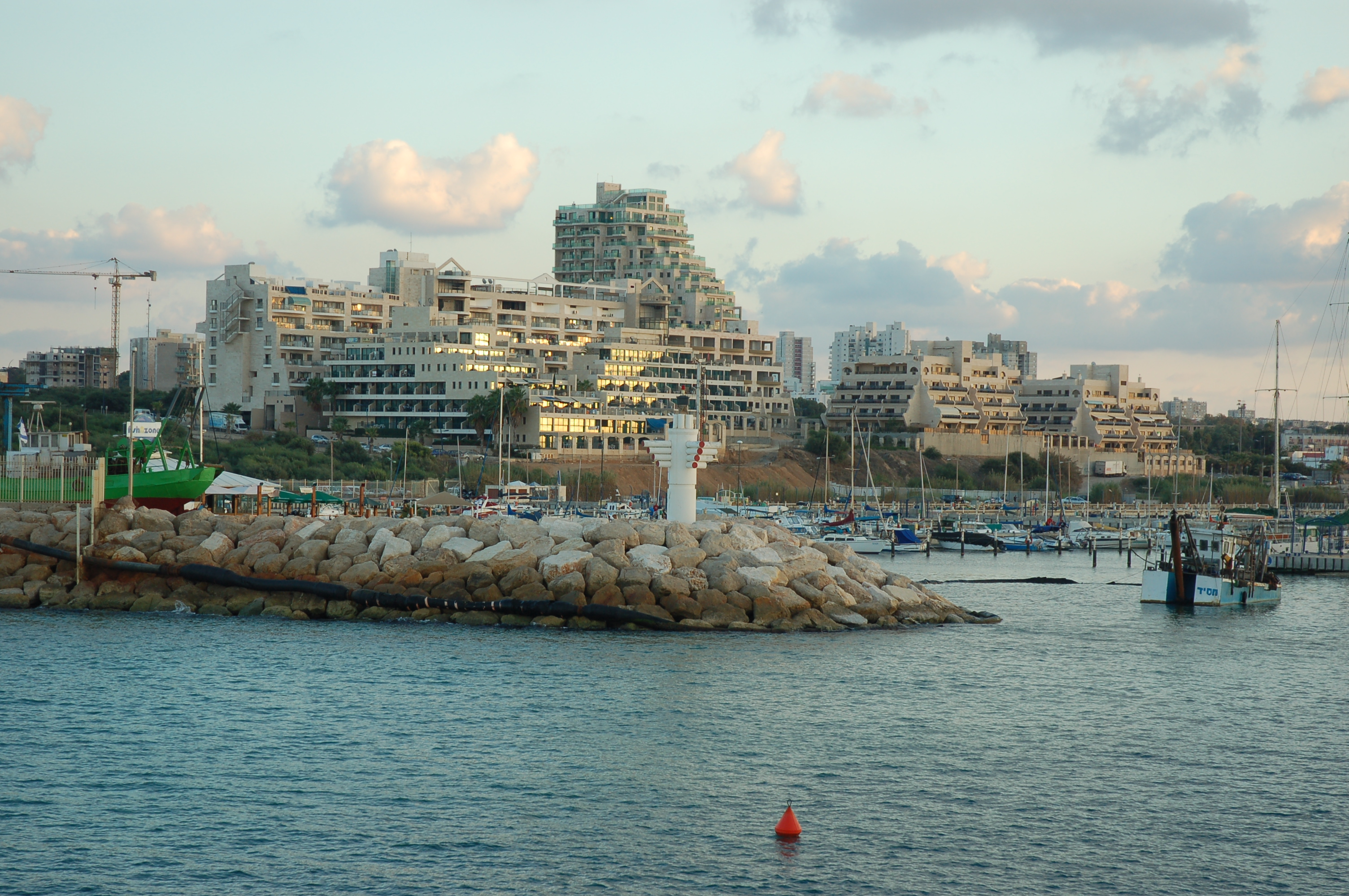 Ashkelon's marina